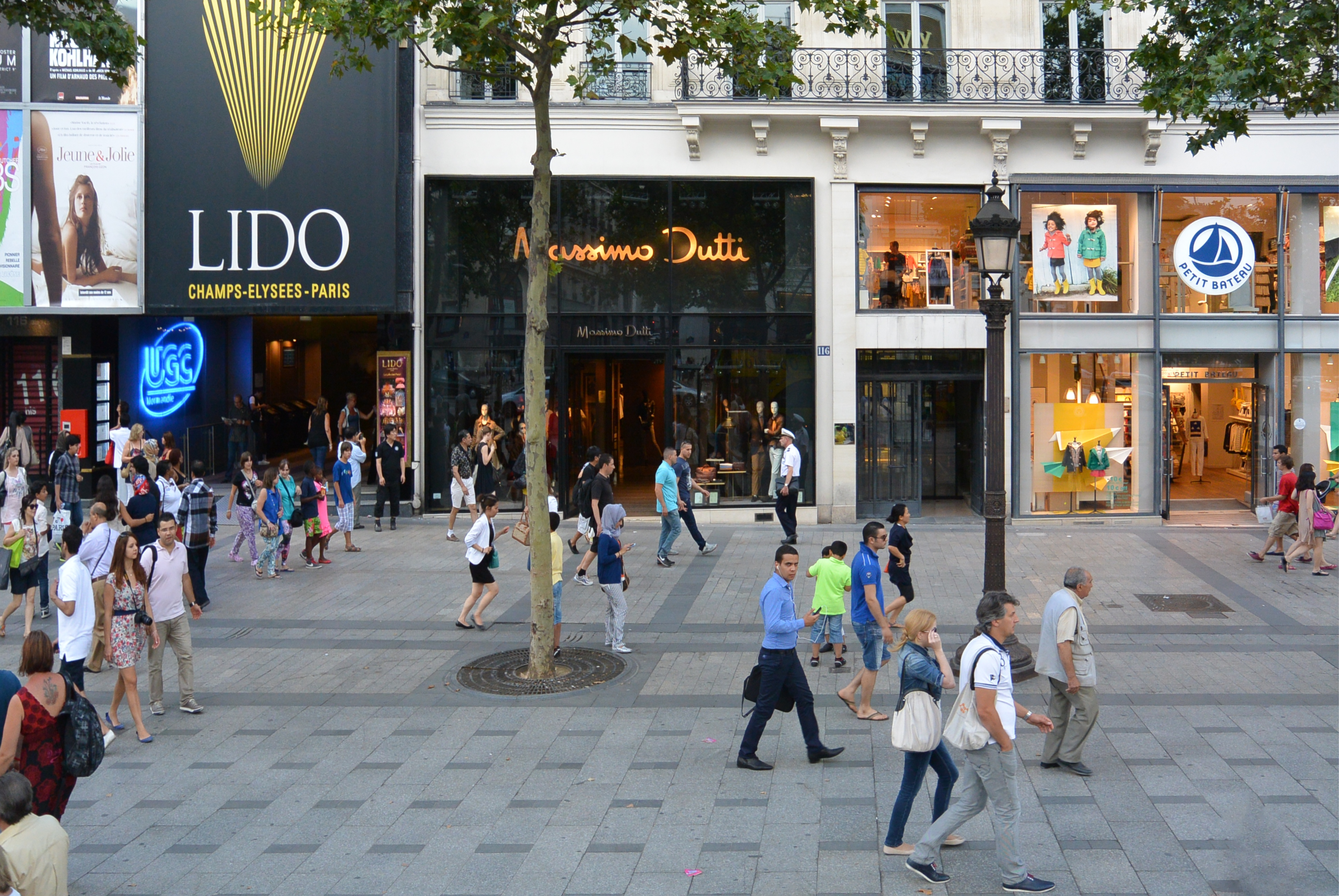 Lido cabaret and Massimo Dutti, Paris